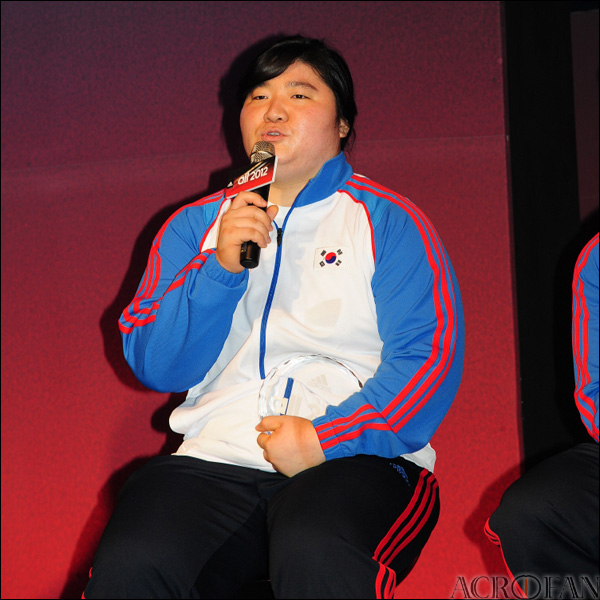 아디다스, 런던올림픽 승리 기원 결단식 개최